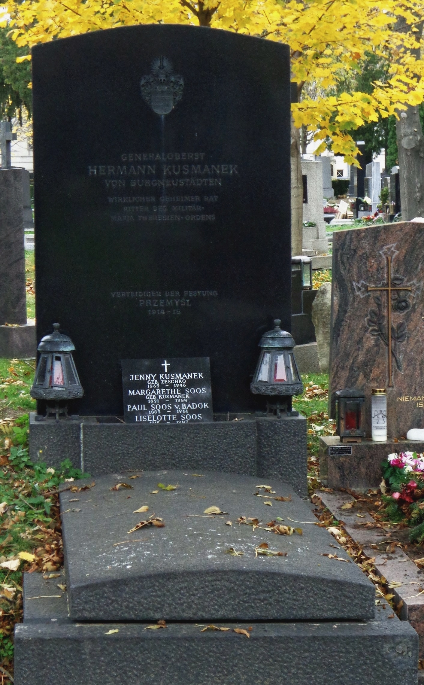 Wiener Zentralfriedhof - Gruppe 30E: Grab von k.u.k. Generaloberst Hermann Kusmanek von Burgneustädten